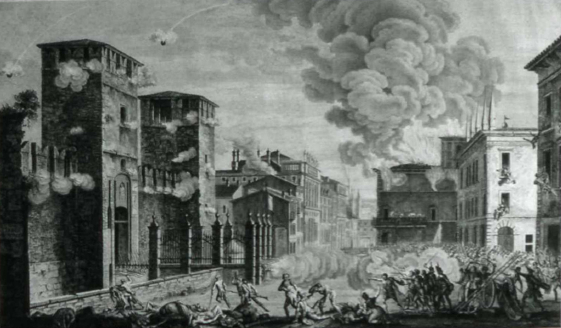 Stampa di inizio ottocento, assalto di Castel Vecchio di Verona durante le Pasque